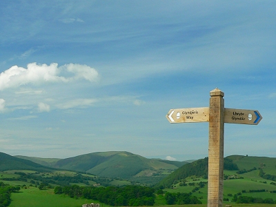 Walisisches Hügelland mit Wegweiser auf dem Glyndwrs Way.